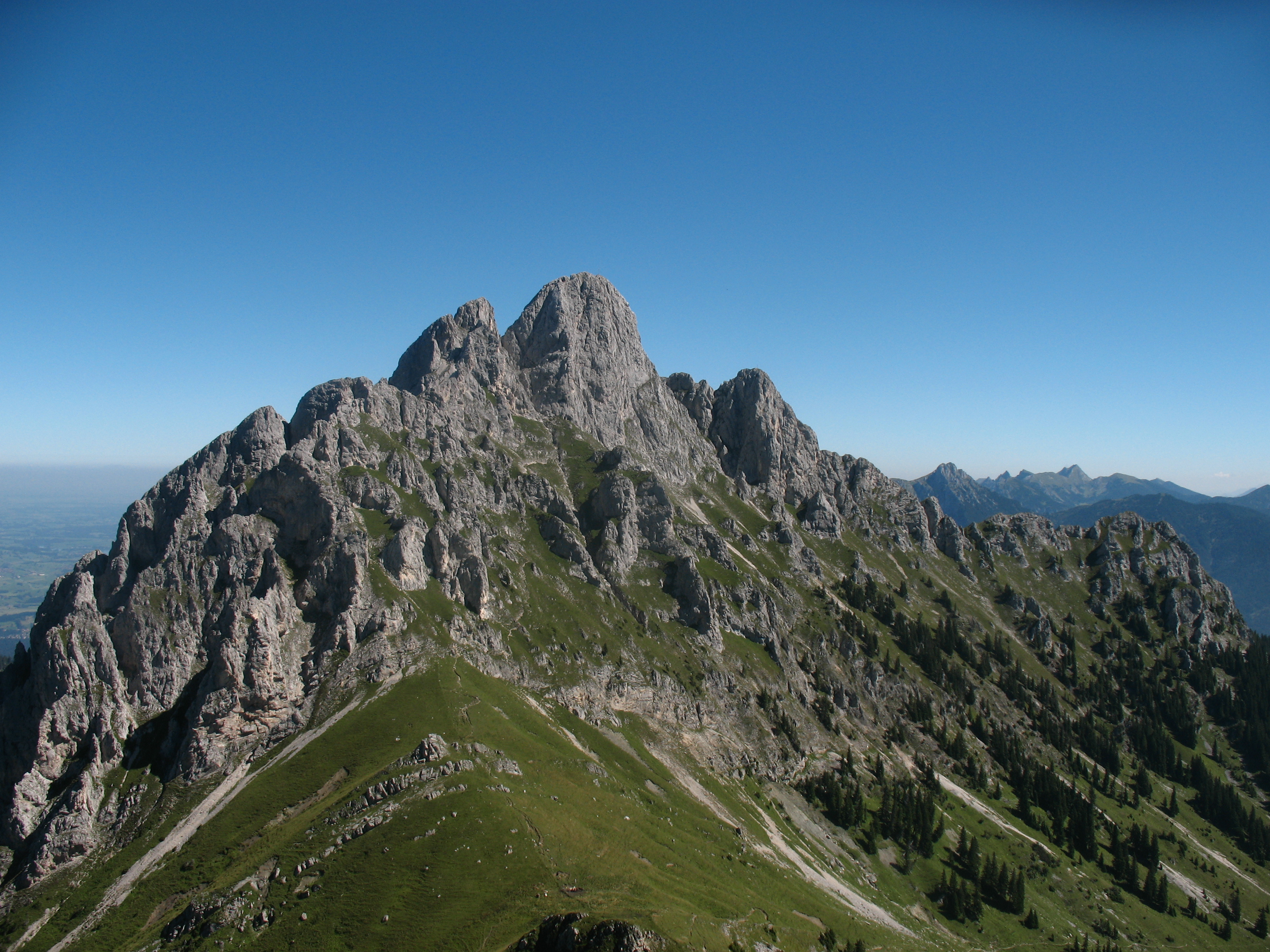 Blick von der Schneid (2009 m) auf die Gehrenspitze (2163 m). Teilweise erkennt man vom Gehrenjoch (1858 m) ausgehend den Steig des Normalwegs durch die Südflanke, er zieht bis zum Kamin der zum Einschnitt links des Gipfels hochzieht, von dort weiter auf der Nordseite und teilweise auf dem Westgrat.